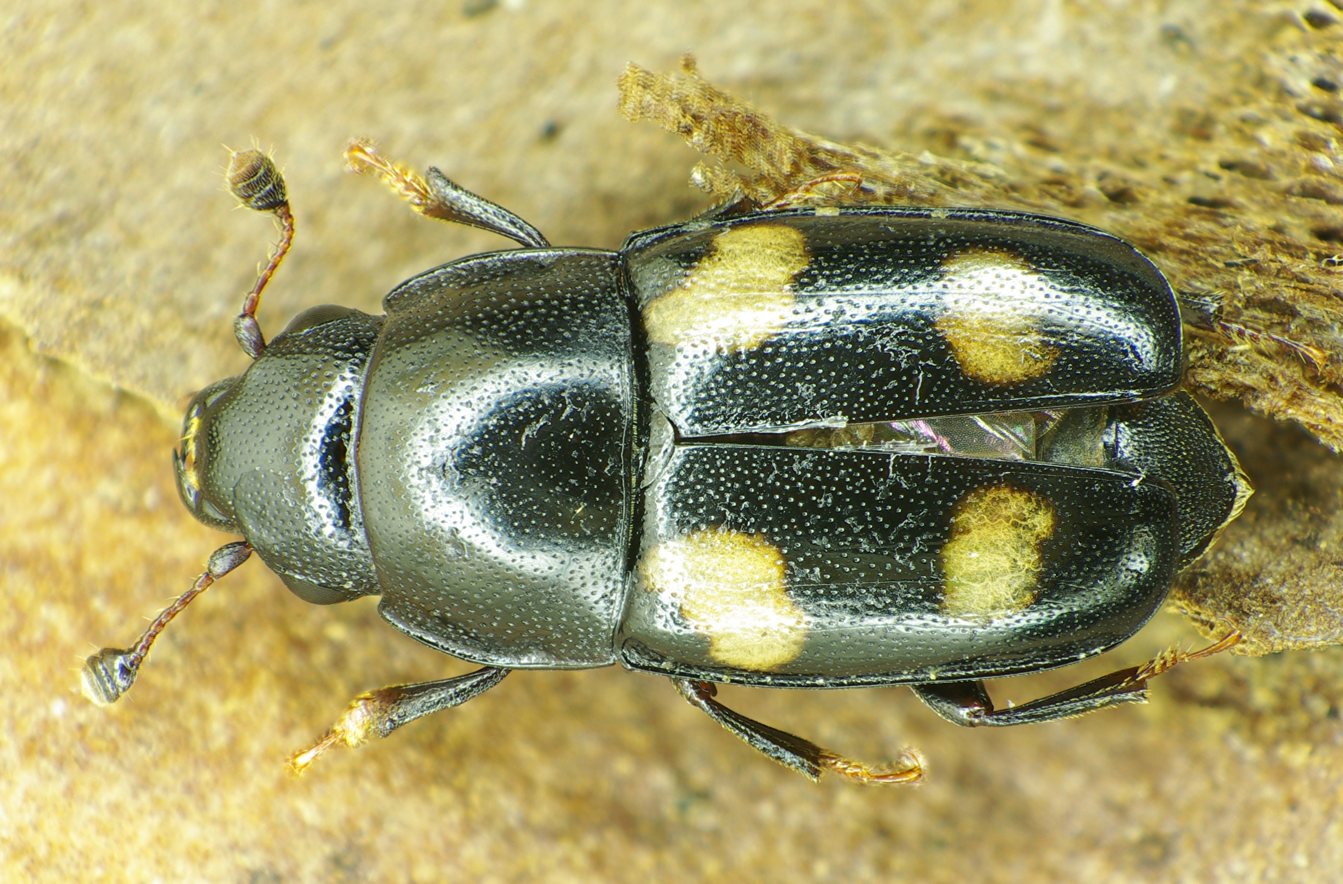 Glischrochilus quadrisignatus von Süddeutschland bei Tuttlingen am 5. Oktober 2012, Oberseite